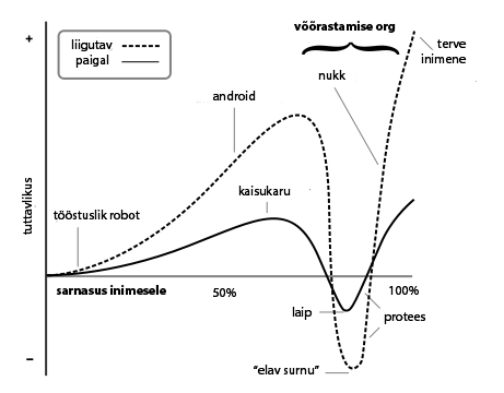 Võõrandamise orgu illustreeriv graafik